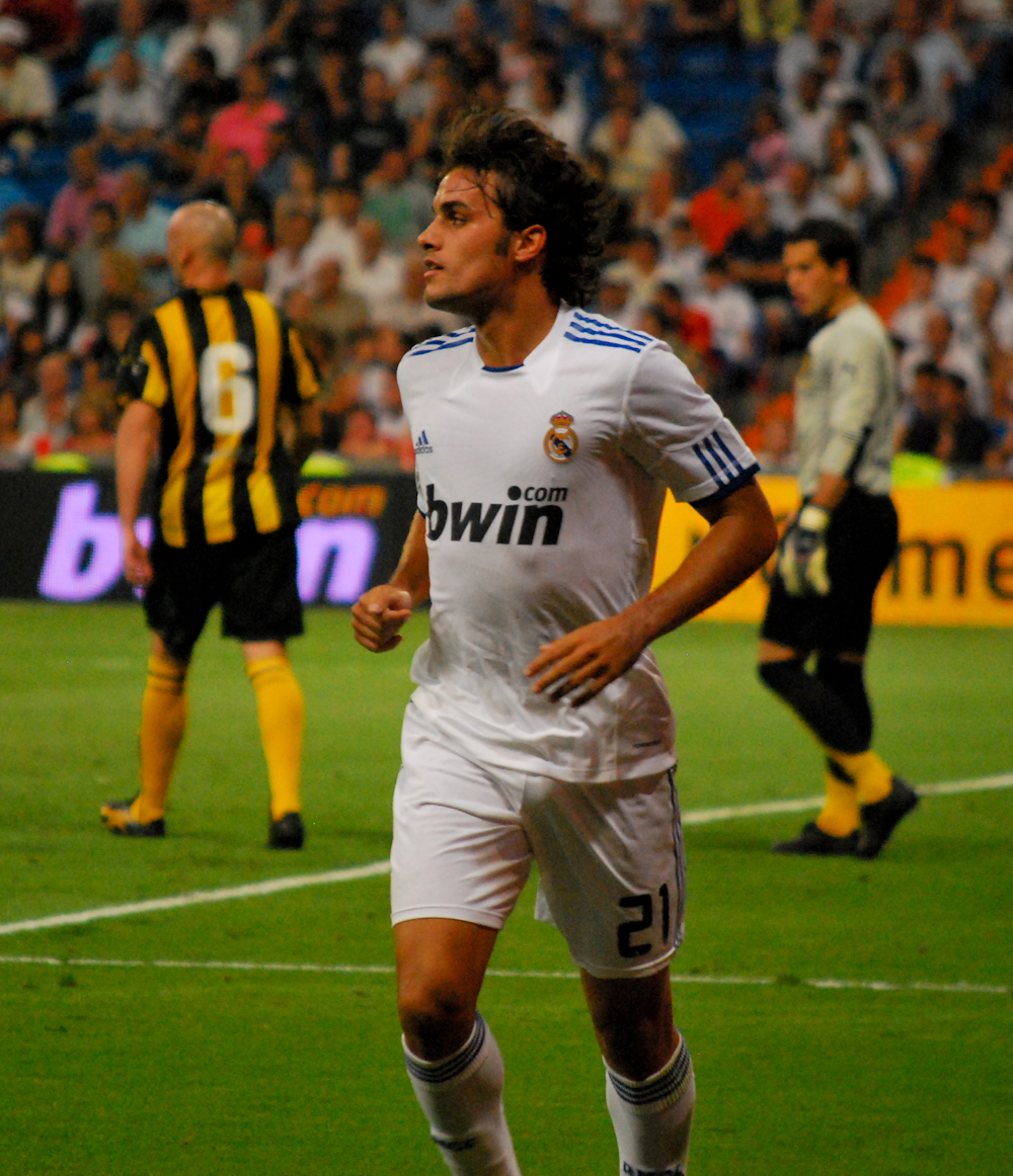 Pedro León playing for Real Madrid